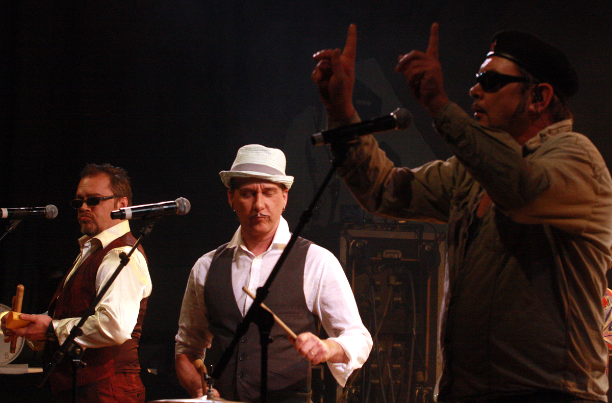 Los Dos y Compañeros bei einem Auftritt in Freiburg 2013